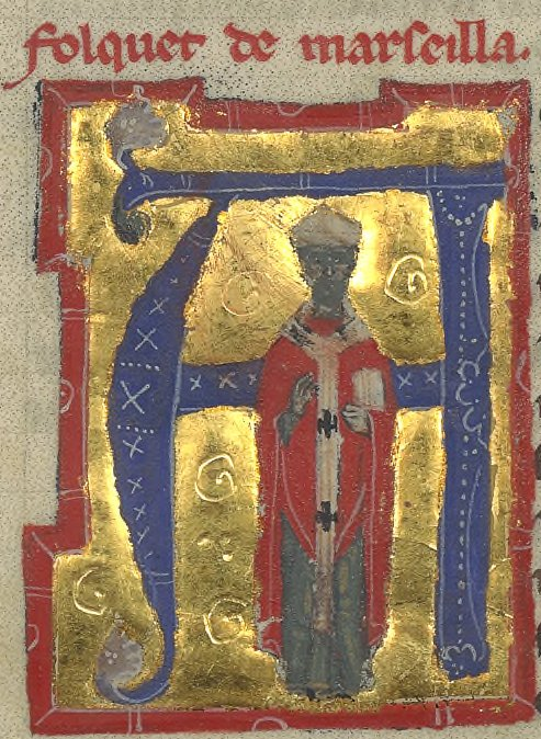 Folquet de Marseille from BNF Français 12473